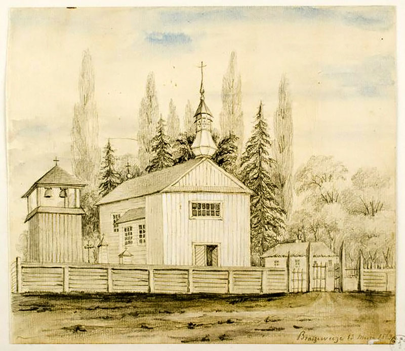 Беларуская (тарашкевіца): Брашэвічы (Braševičy). Царква